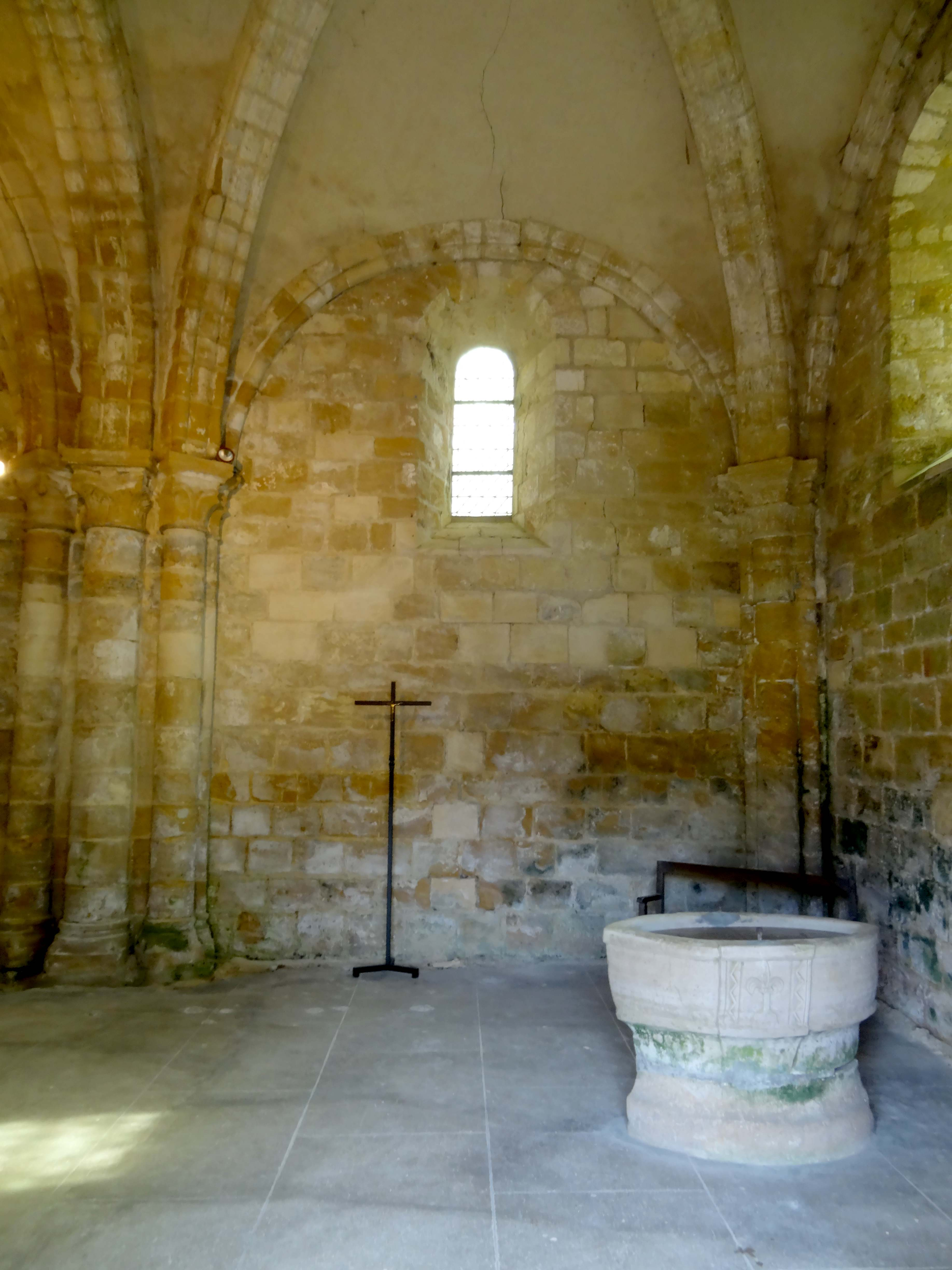 Intérieur de l'église - voir titre.